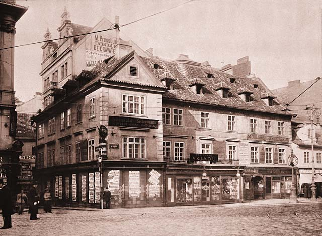 Při nároží ulic Na Příkopě a Na Můstku stál dům U Zlatého jednorožce čp. 388, který byl zbořen v r. 1901.